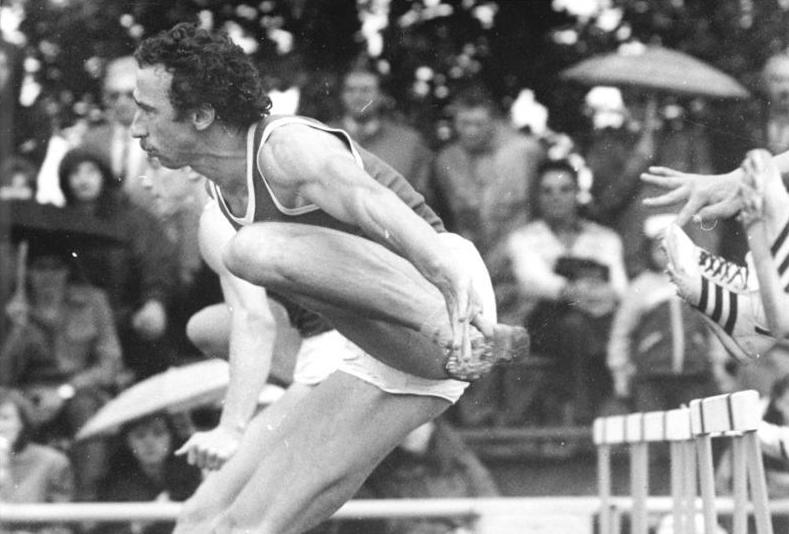 Thomas Munkelt ADN-ZB Mittelsstädt-24.5.84 Berlin: Leichtathletik-Sportfest - Trotz widriger Witterungsverhältnisse erreichte Olympiasieger Thomas Munkelt (SC DHFK Leipzig) über 110 m Hürden mit 13,66 s eine beachtlich Zeit.